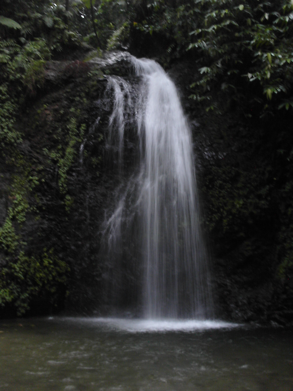 Cascade de Saut Gendarme à Fonds-Saint-Denis en Martinique